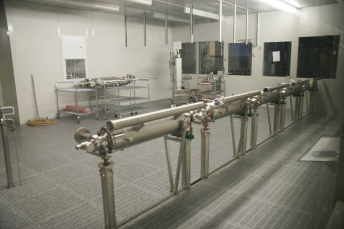 Reinraum von DESY in Hamburg; der Reinraum (teilweise Klasse 10, teilweise Klasse 100) wird genutzt um die Kavitäten zu reinigen und zusammenzubauen'; zu sehen sind fünf Kavitäten, die zusammengebaut wurden. Veröffentlichung mit freundlicher Genehmigung DESY, Hamburg.